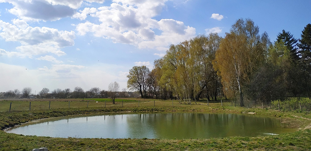 Невелике озеро, розташоване в центрі села Савин